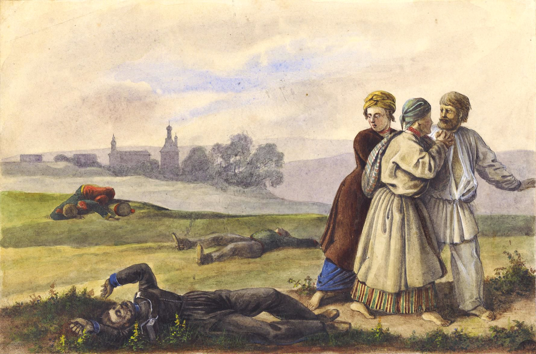 Беларуская (тарашкевіца): Астроўна (Astroŭna), каля мястэчка, 1 жніўня 1812